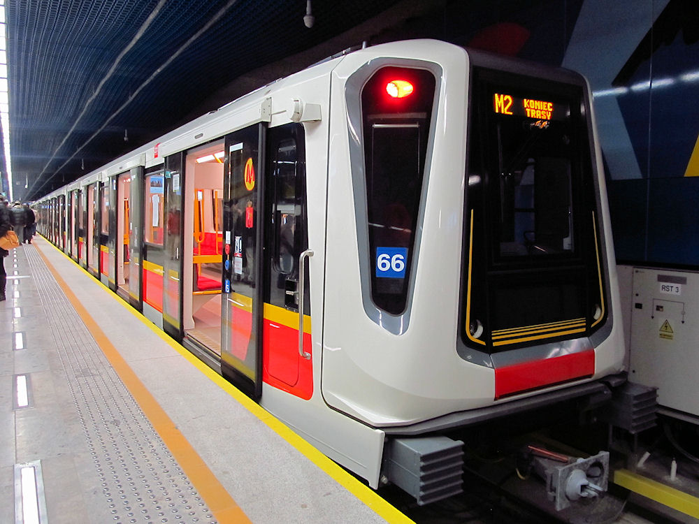 Metro, second line (M2), station Dworzec Wileński. 08.03.2015 r.